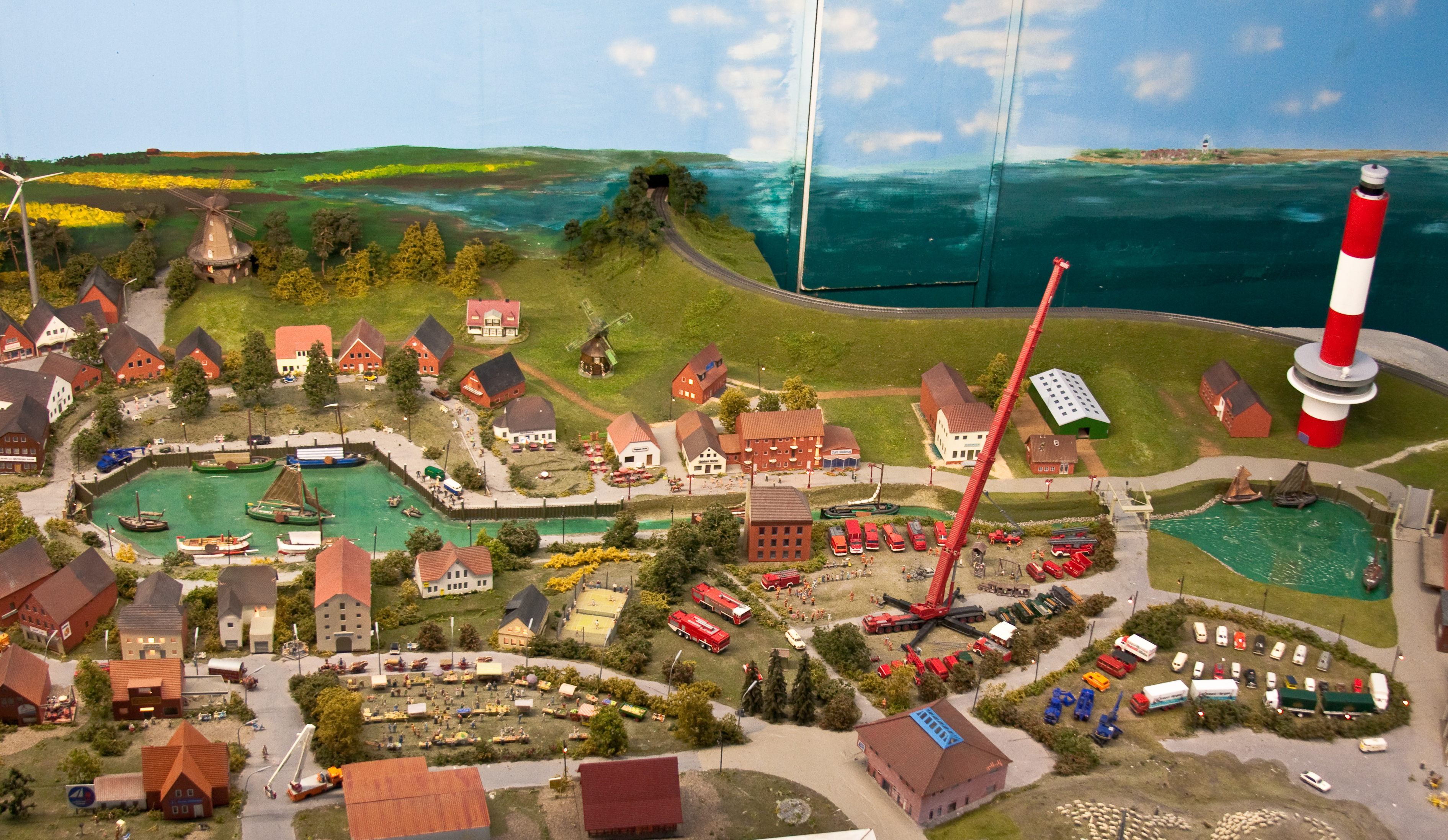 Ausschnitt des Bauabschnitts der Nordsee